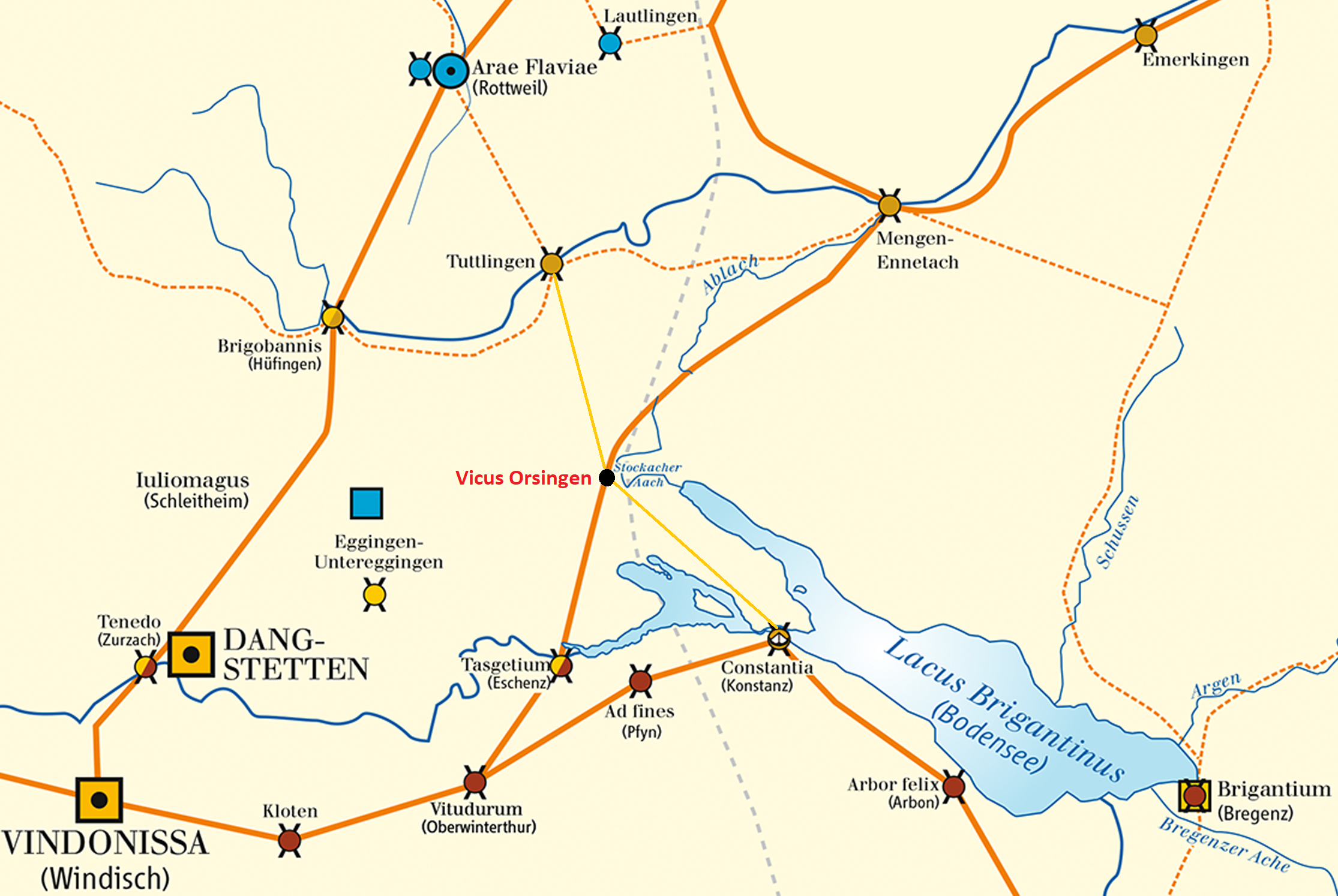 Die bereits vorhandene Karte "Limes2.png" abgeändert, d. h. Ausschnitt gewählt, die Römerstraßen und Lage des Vicus Orsingen eingezeichnet.